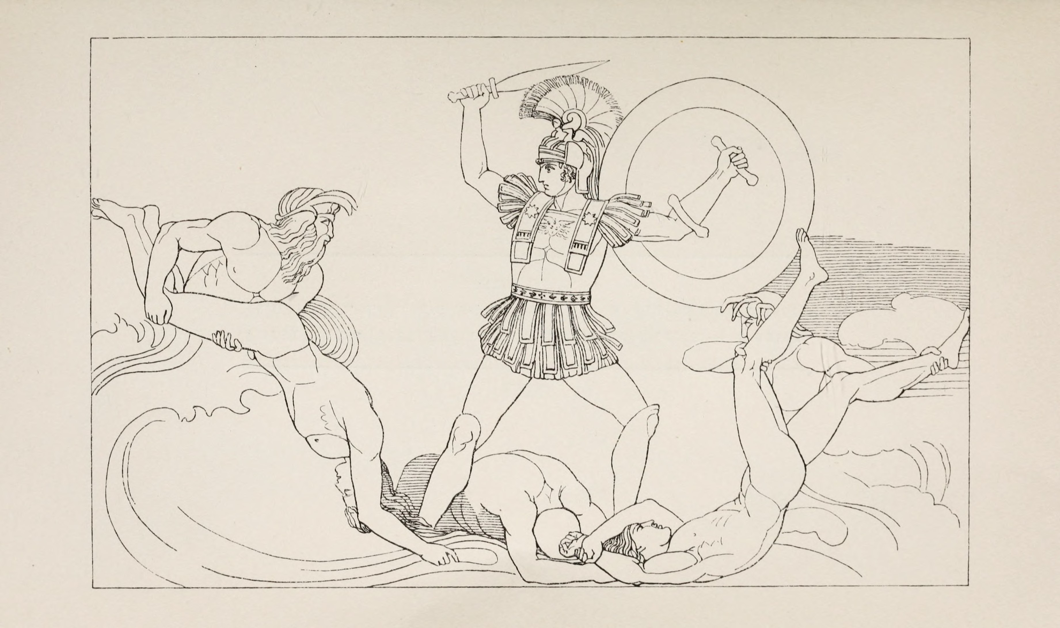 Achill im Kampf mit dem Flußgott (von links nach rechts Skamander, Achill, Simois). – Homer, Ilias XXI. 324. Schwab, Sagen des klassischen Altertums II. 23.